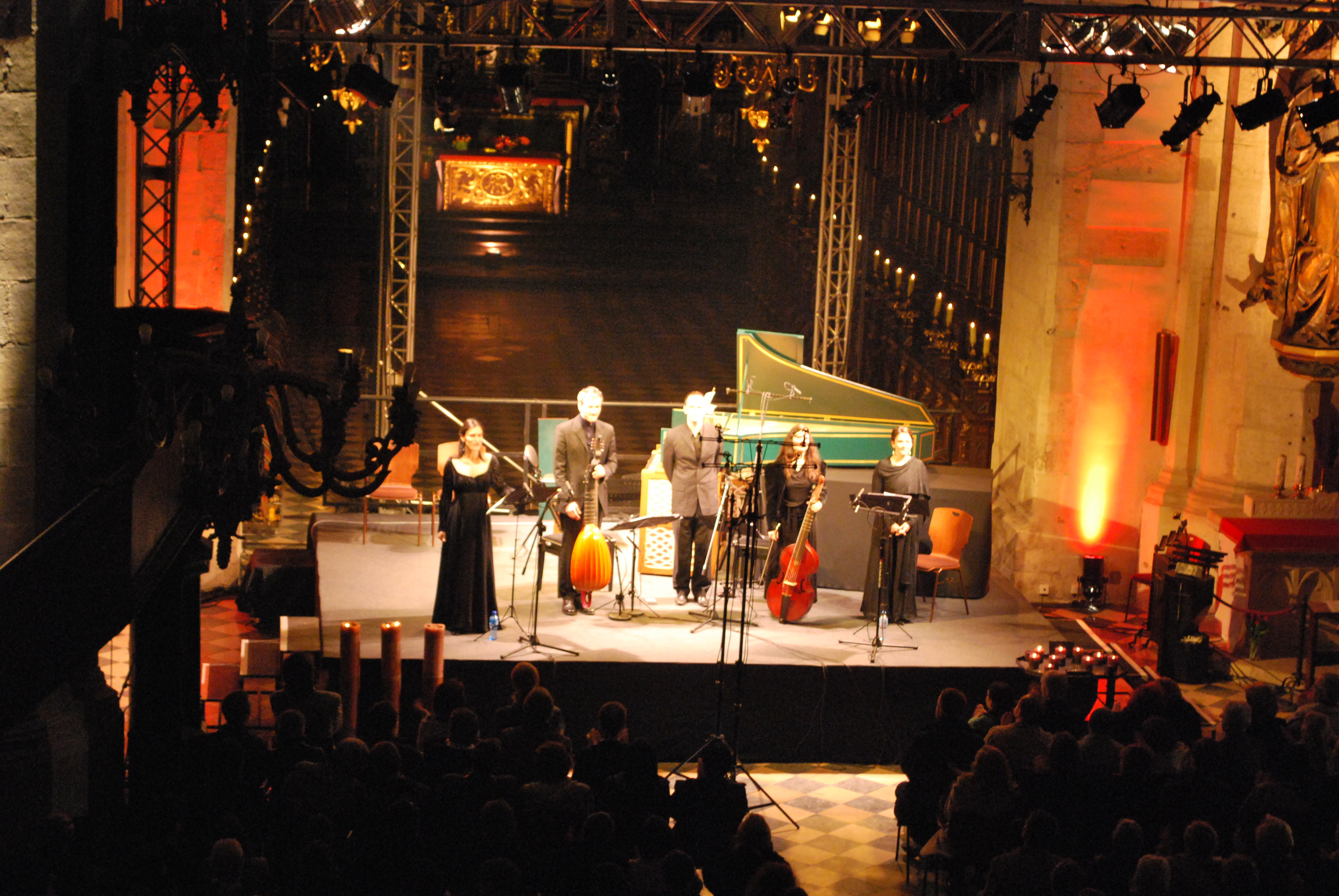 Le Poème Harmonique podczas koncertu w kościele św. Katarzyny w Krakowie w ramach festiwalu Misteria Paschalia, 8 kwietnia 2009